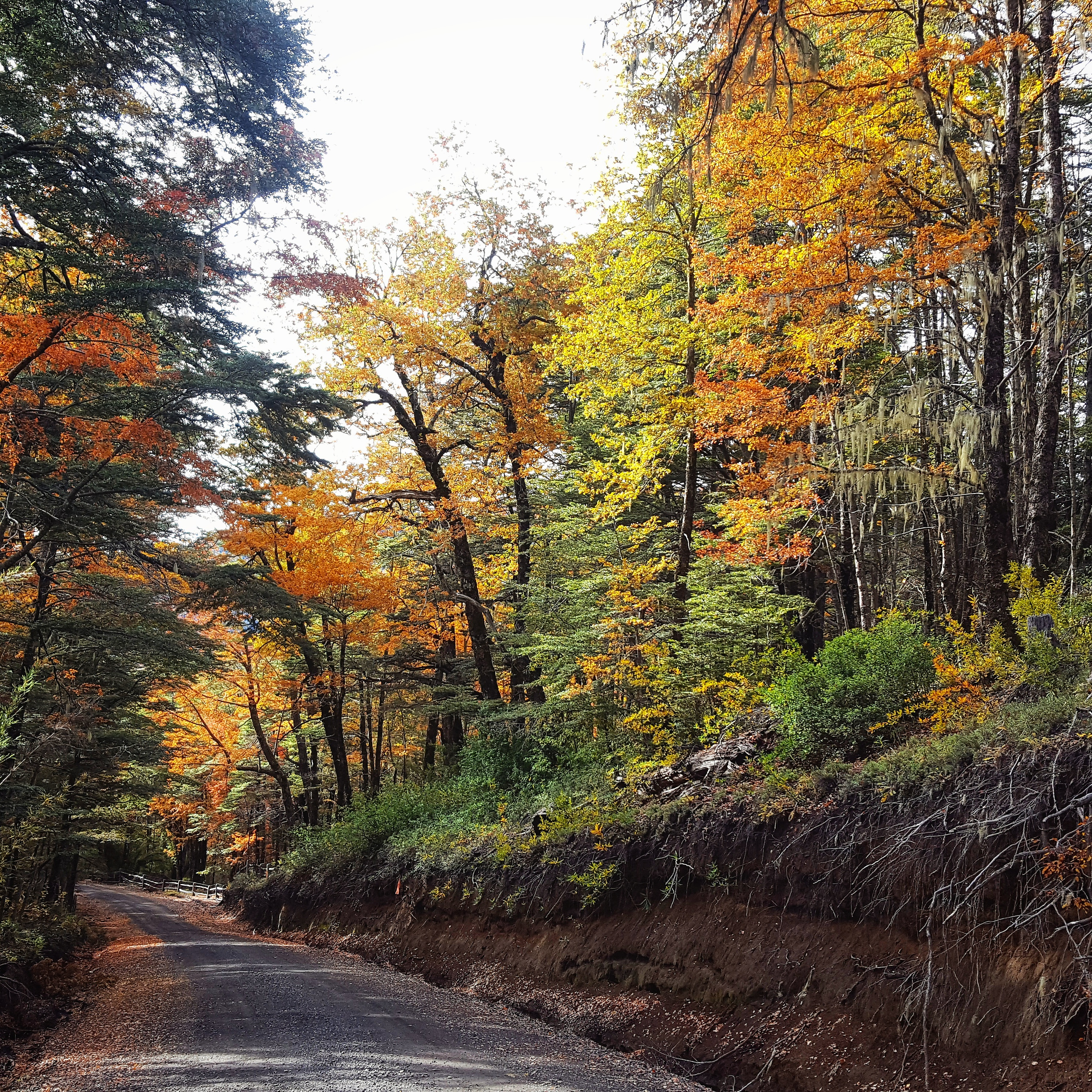 El camino en otoño está repleto de colorido.